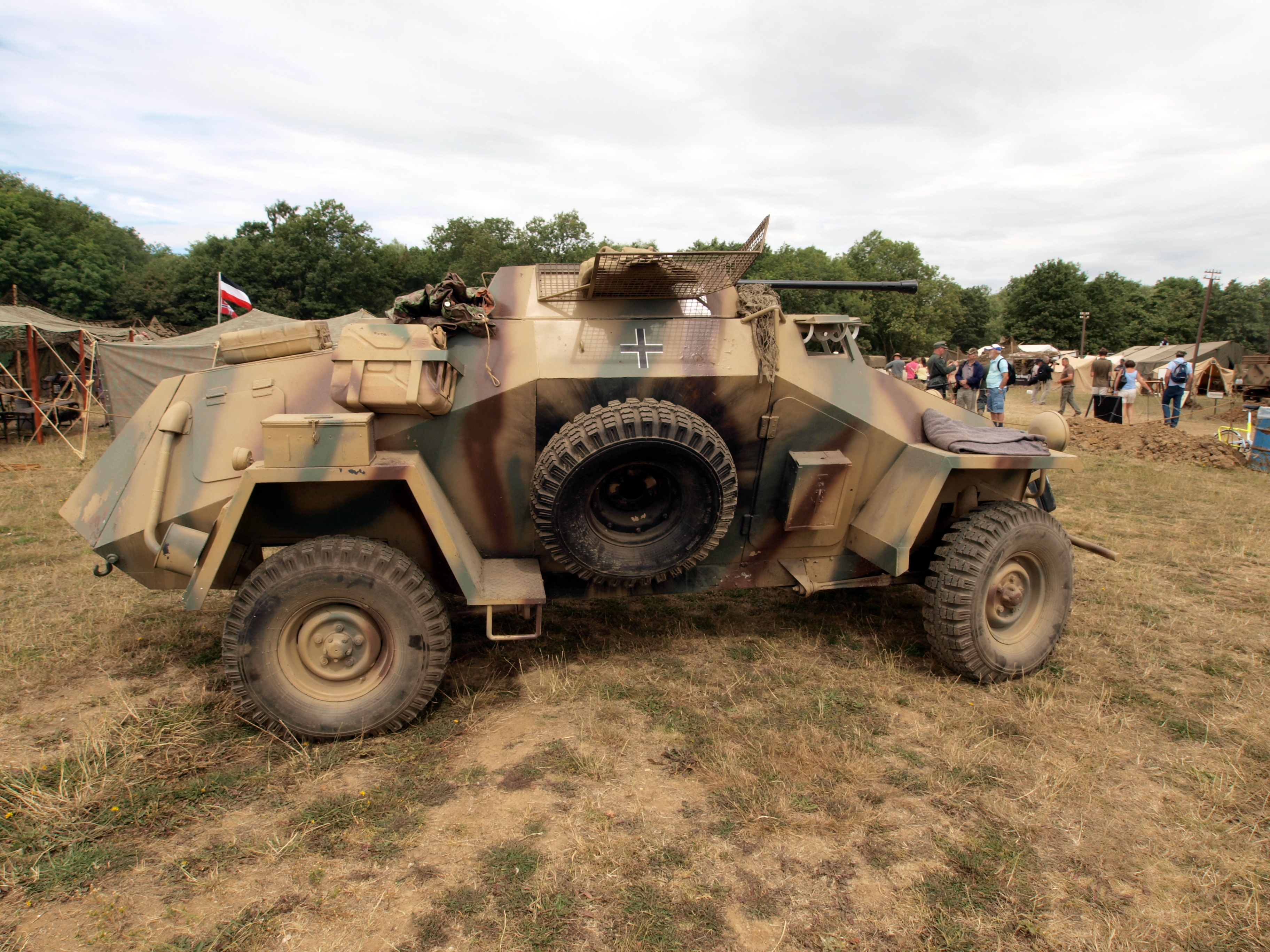 SdKfz. 222 Leichter Panzerspähwagen